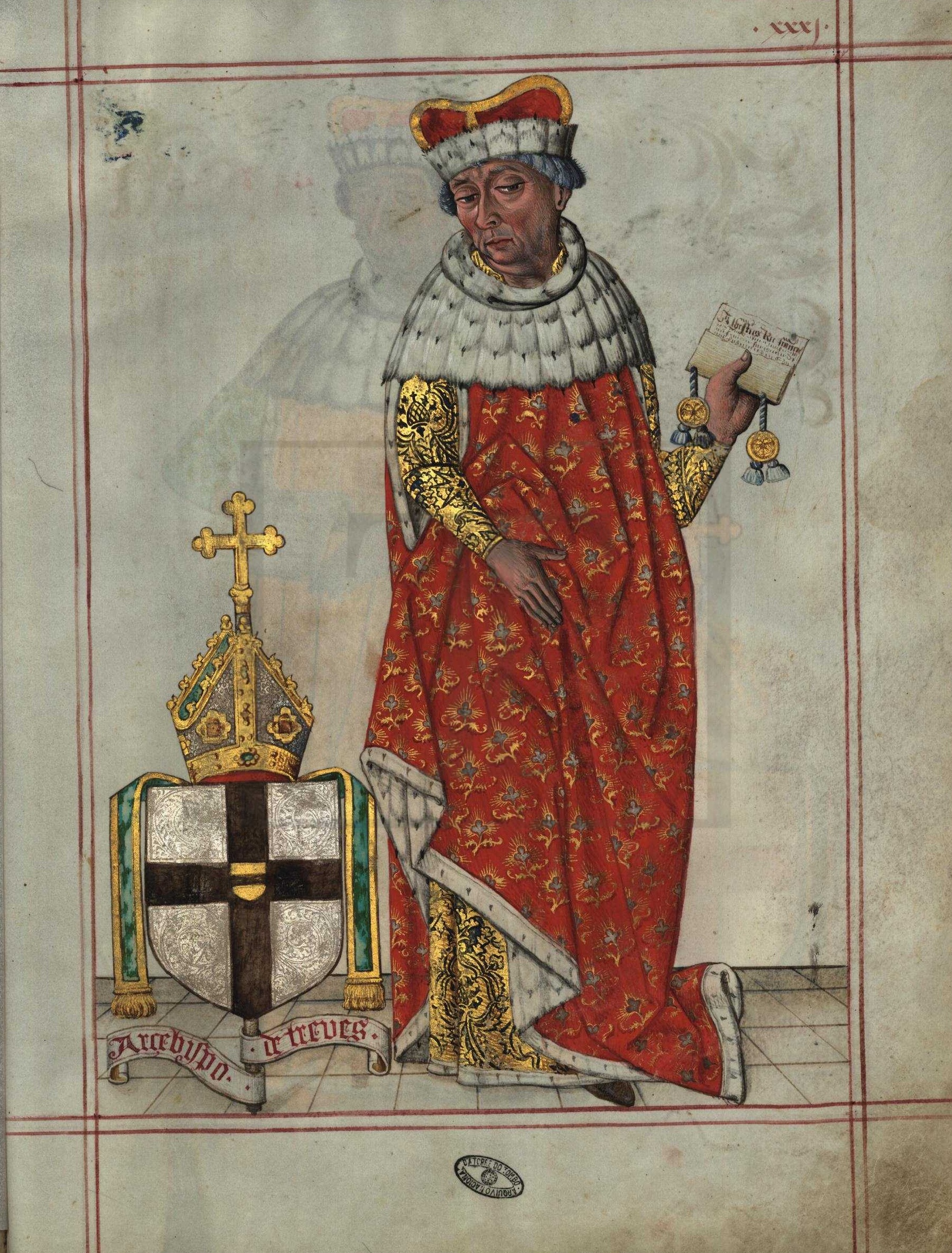 Livro do Armeiro-Mor, Arcebispo de Trèves (fl 31)